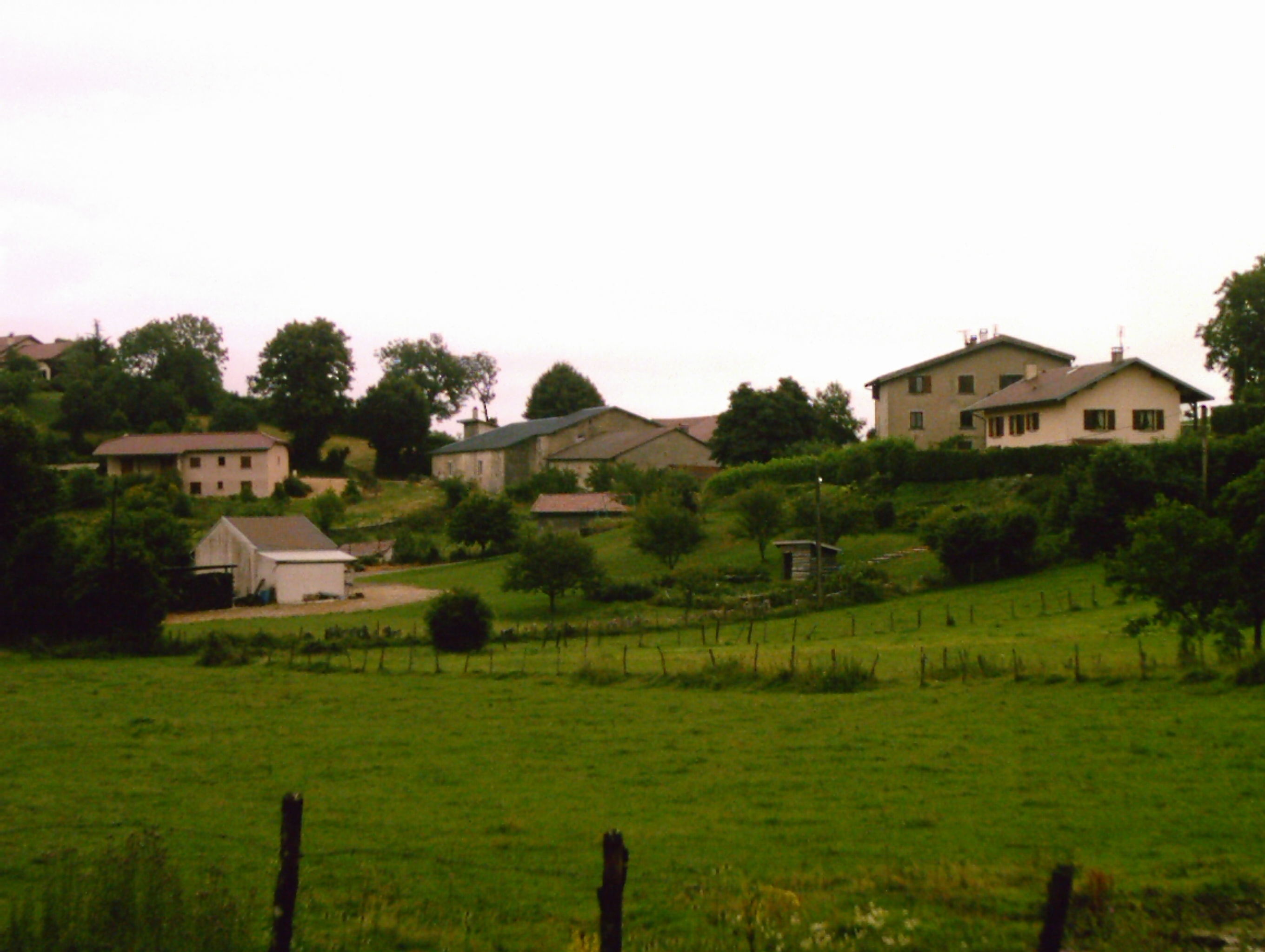 Le hameau d'Etable, commune de Ceignes (Ain, FRANCE)